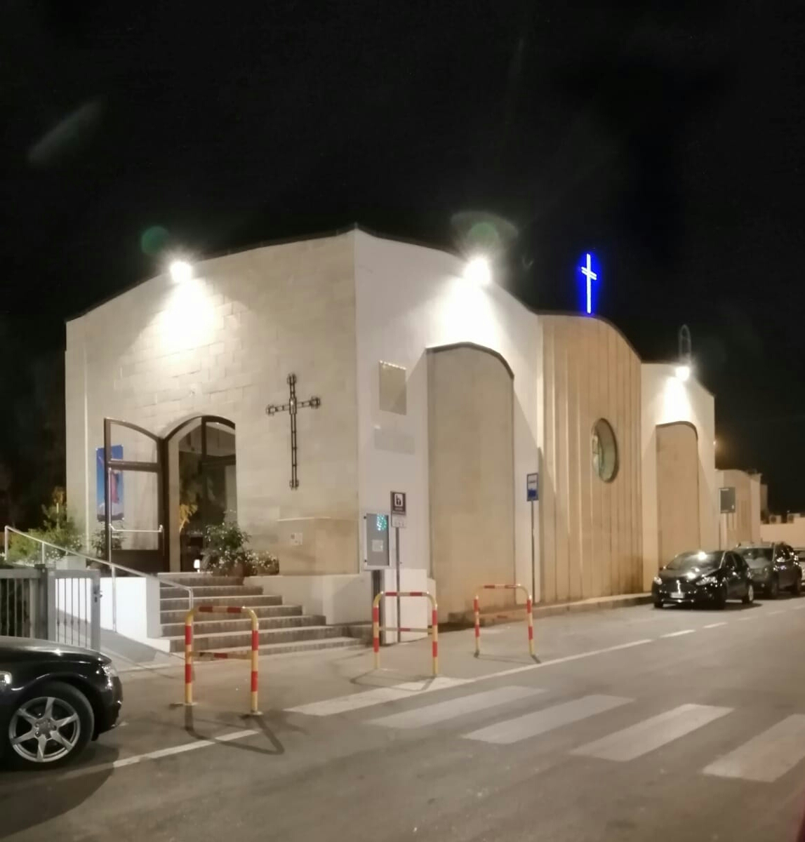 Chiesa di Maria Santissima Assunta, nella frazione di Campomarino di Maruggio.